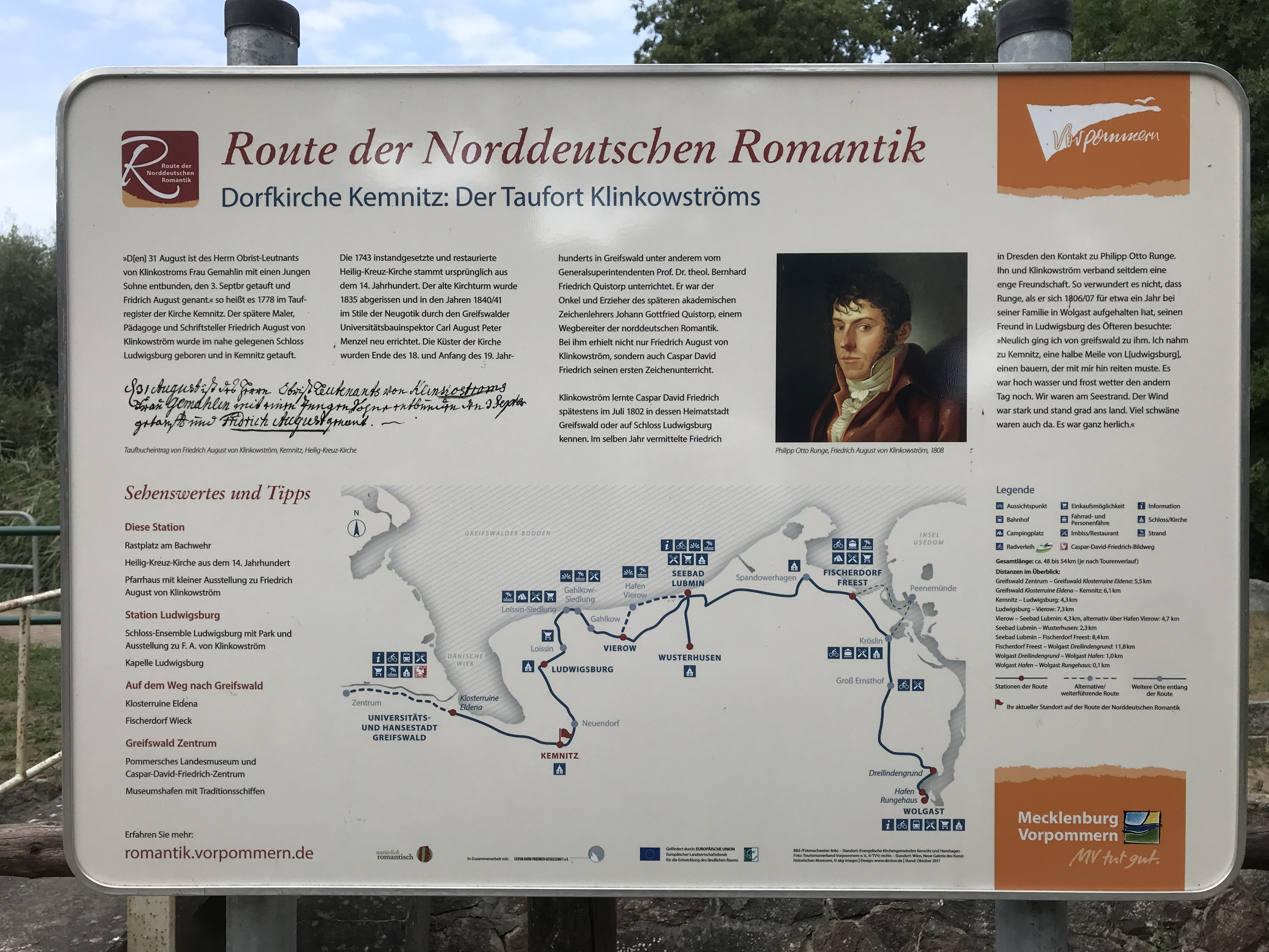 Die Route der Norddeutschen Romantik ist ein 54 km langer Lehrpfad im Landkreis Vorpommern-Greifswald. Er führt von Greifswald nach Wolgast und informiert auf zehn Stationen über bedeutende romantische Maler der Region.